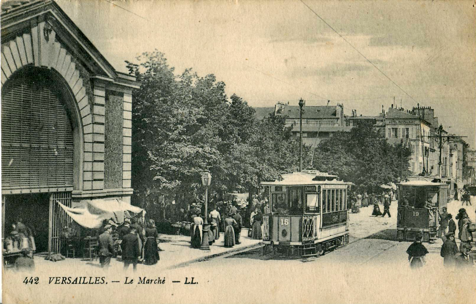 Carte postale ancienne éditée par LL, n°442 : VERSAILLES - Le Marché